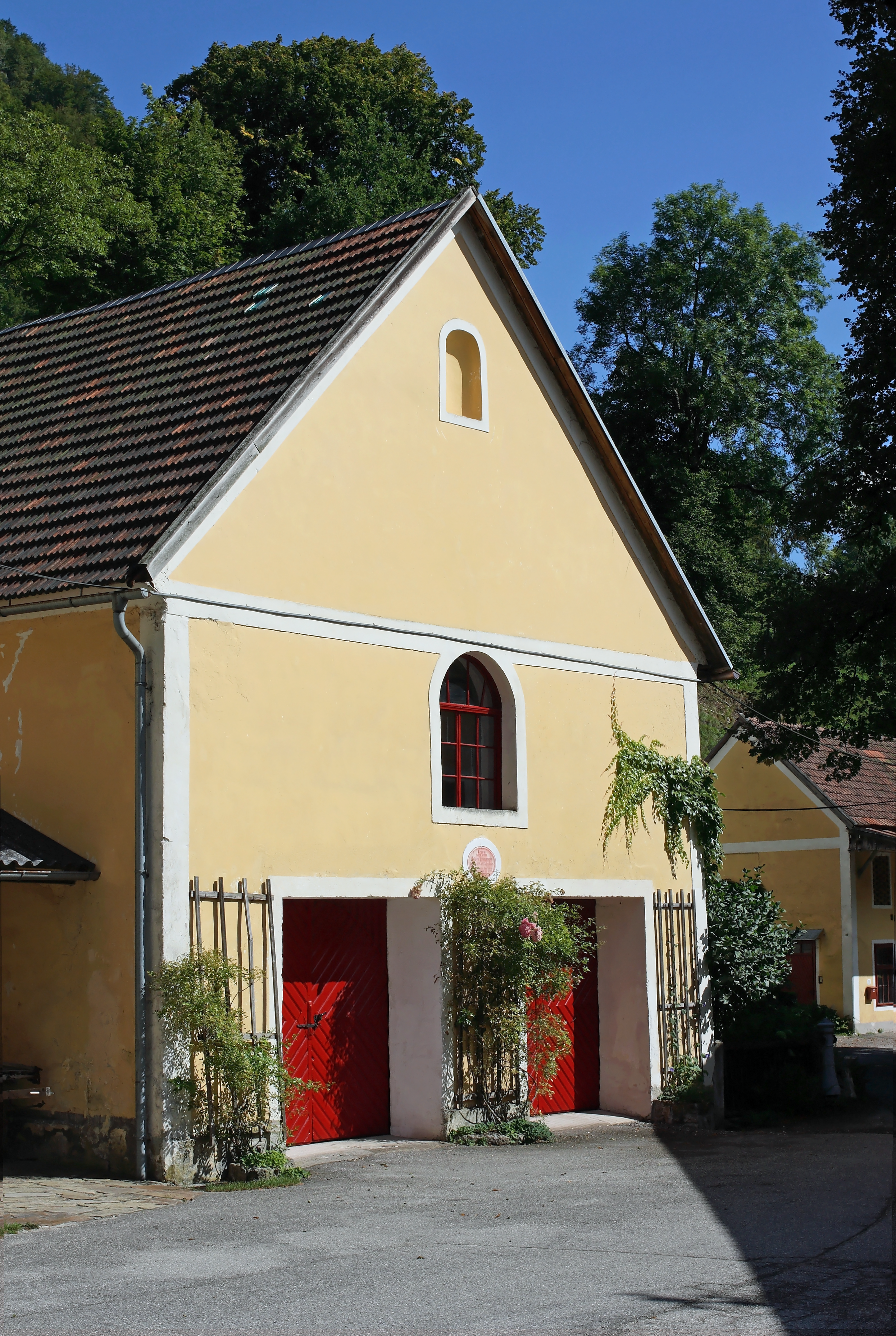 Der Hammer im Freilichtmuseum Schmiedleithen (Grünburg, Oberösterreich)